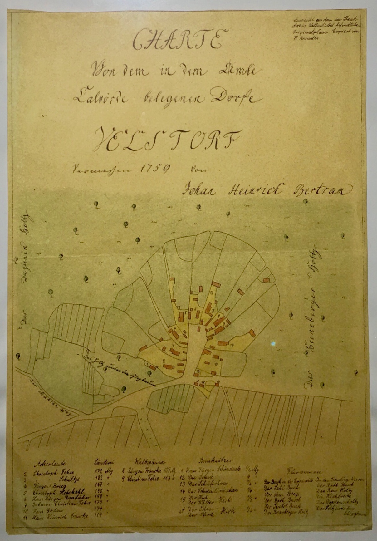 Ortskern von Velsdorf 1759